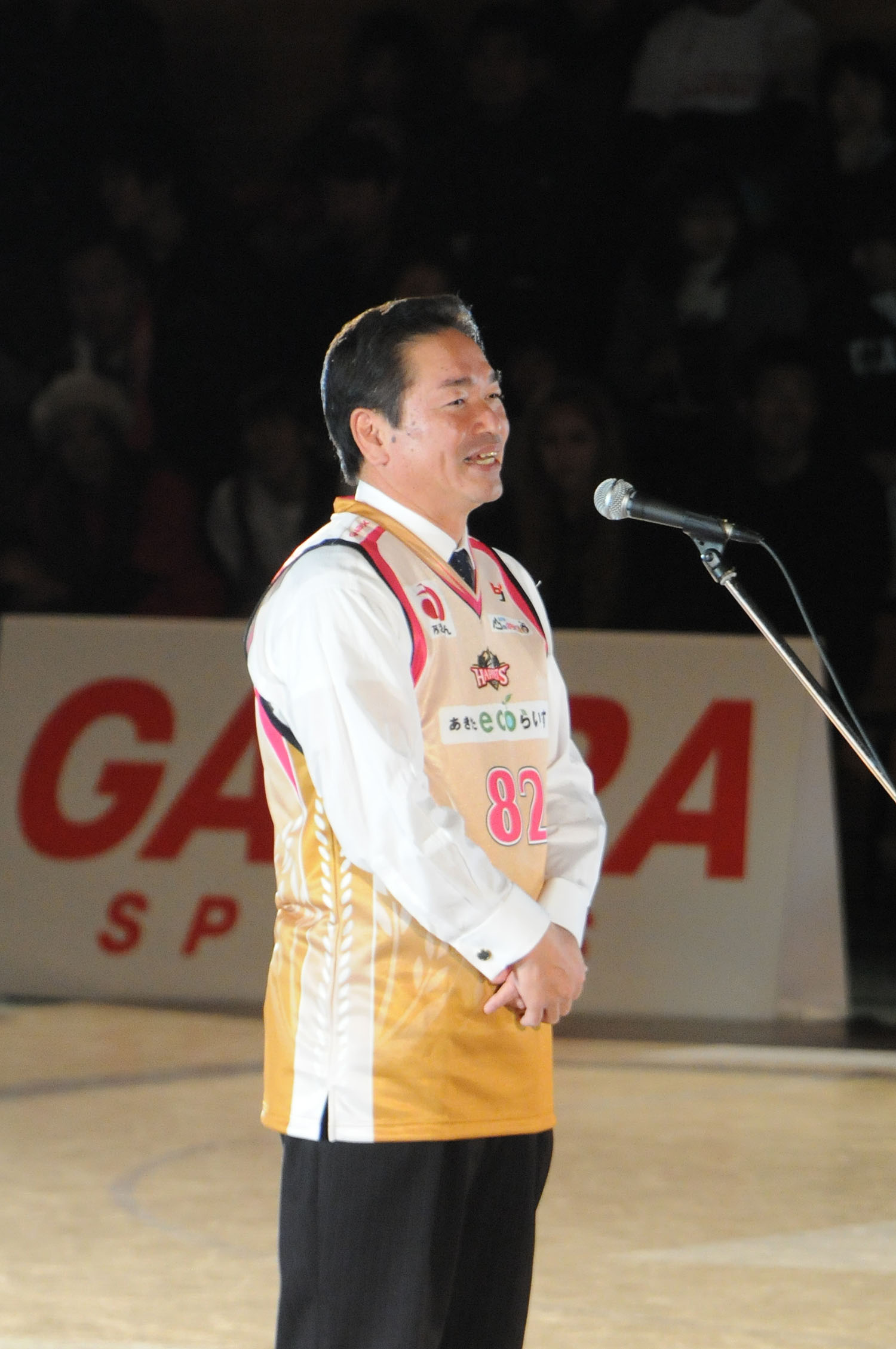 斉藤滋宣能代市長。能代市総合体育館で。